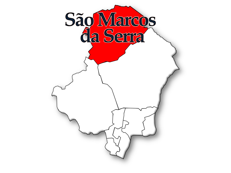 Censos 1864/2011